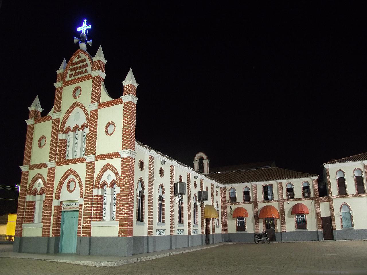 Igreja Matriz de Santa Teresa. Imperatriz Maranhão, Brasil.